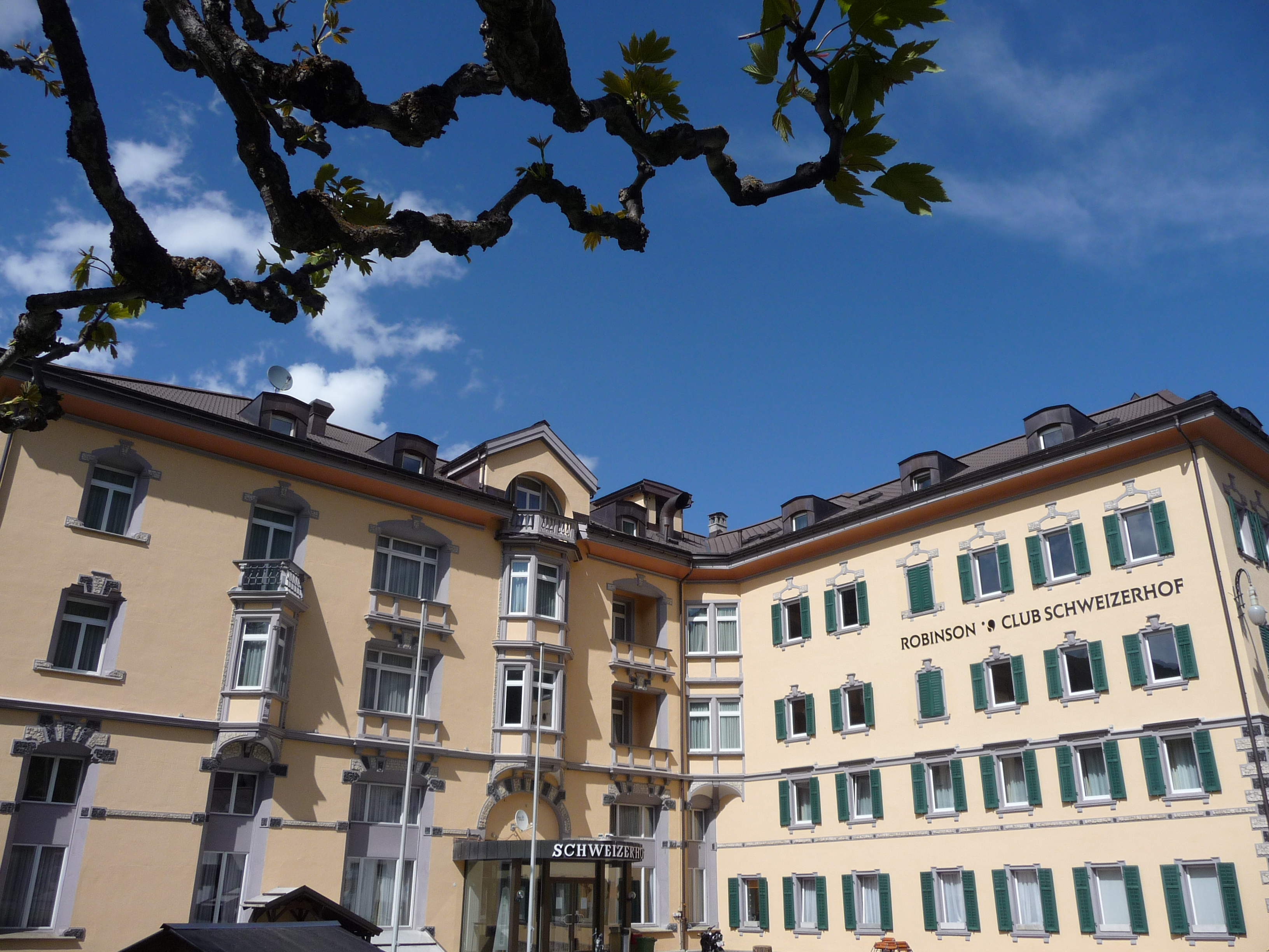 Hotel Schweizerhof in Vulpera erbaut 1898-1900 durch Karl Gottlieb Koller, heute Robinson Club